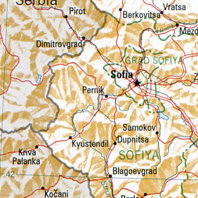 Pernik - Lage des Ortes in Bulgarien